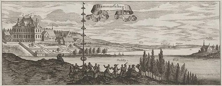 Hammarschog